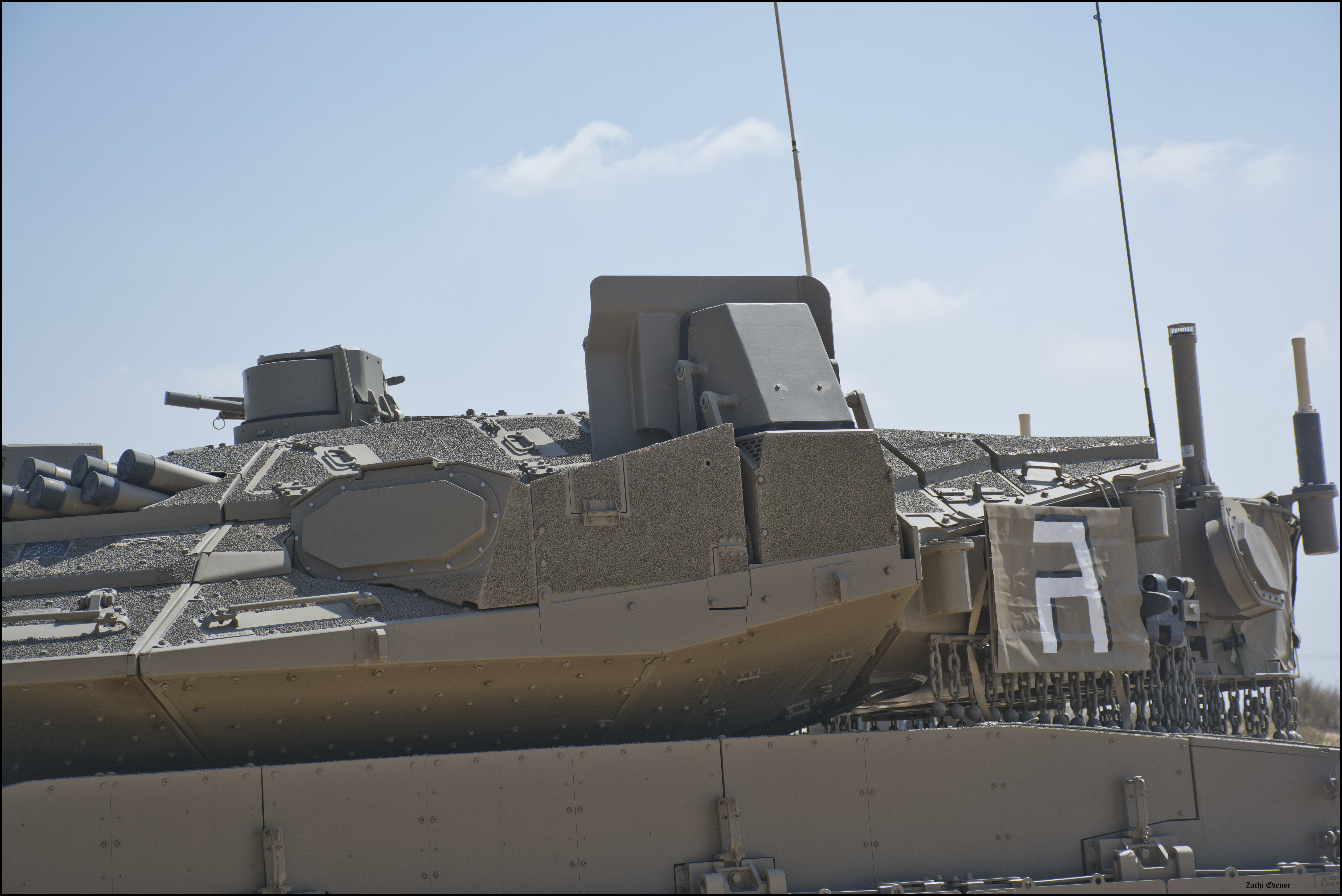 Rafael's Windbreaker - Trophy Active Protection System, Our IDF 70, Israel מערכת הגנה אקטיבית "מעיל רוח" של רפא"ל, תערוכת צה"ל שלנו 70, ישראל